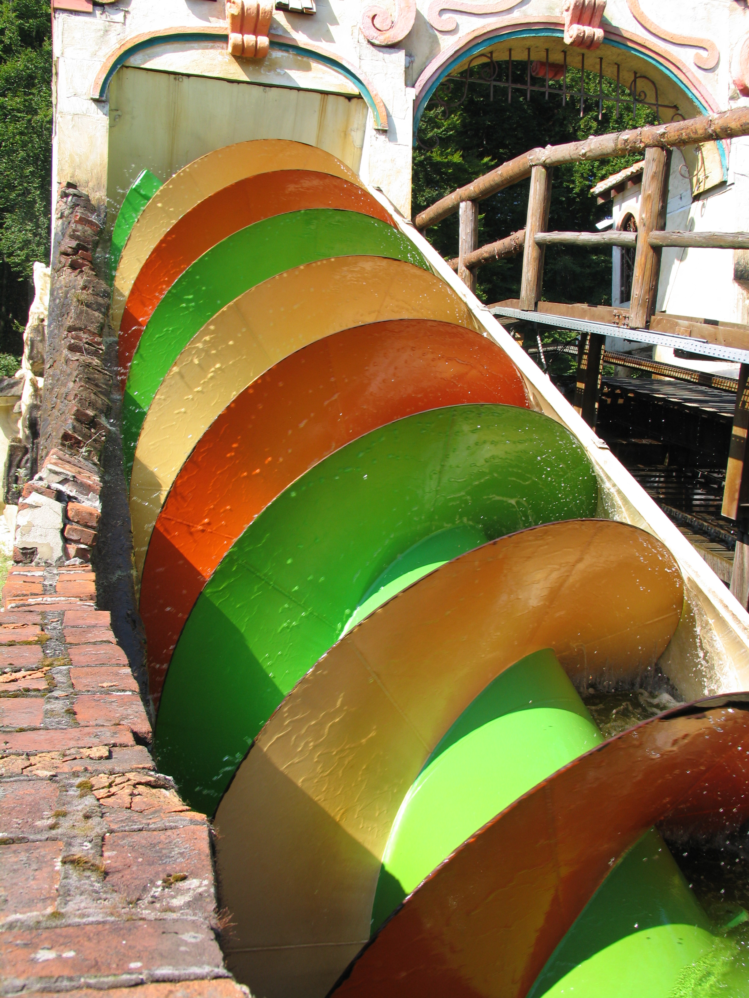 Archimedes' screw Rio Grande at Fort Fun Abenteuerland